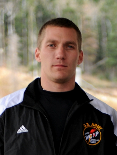 U.S. bobsledder 2nd Lt. Chris Fogt